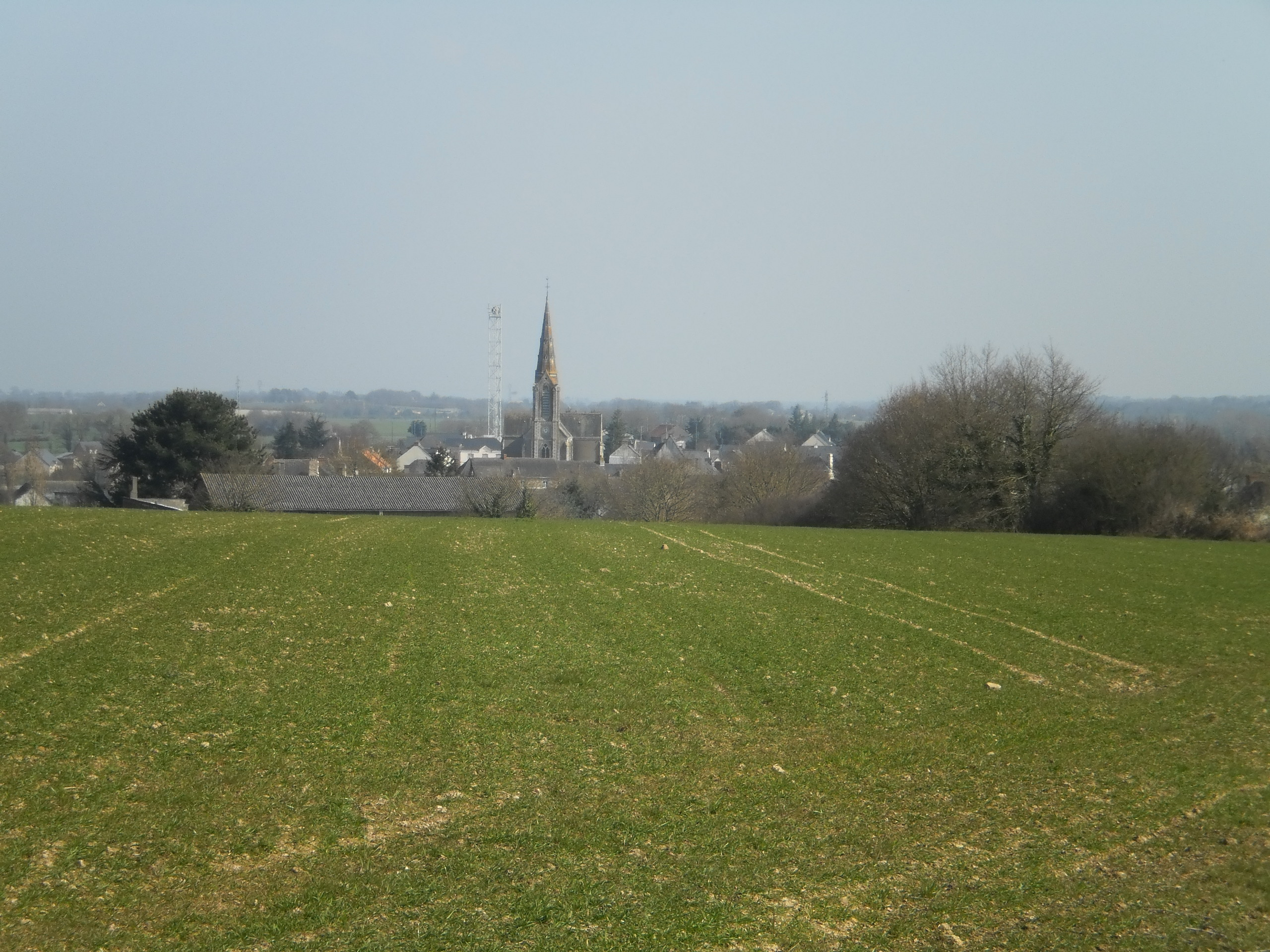 Pierric (Loire-Atlantique, France) - entrée du bourg